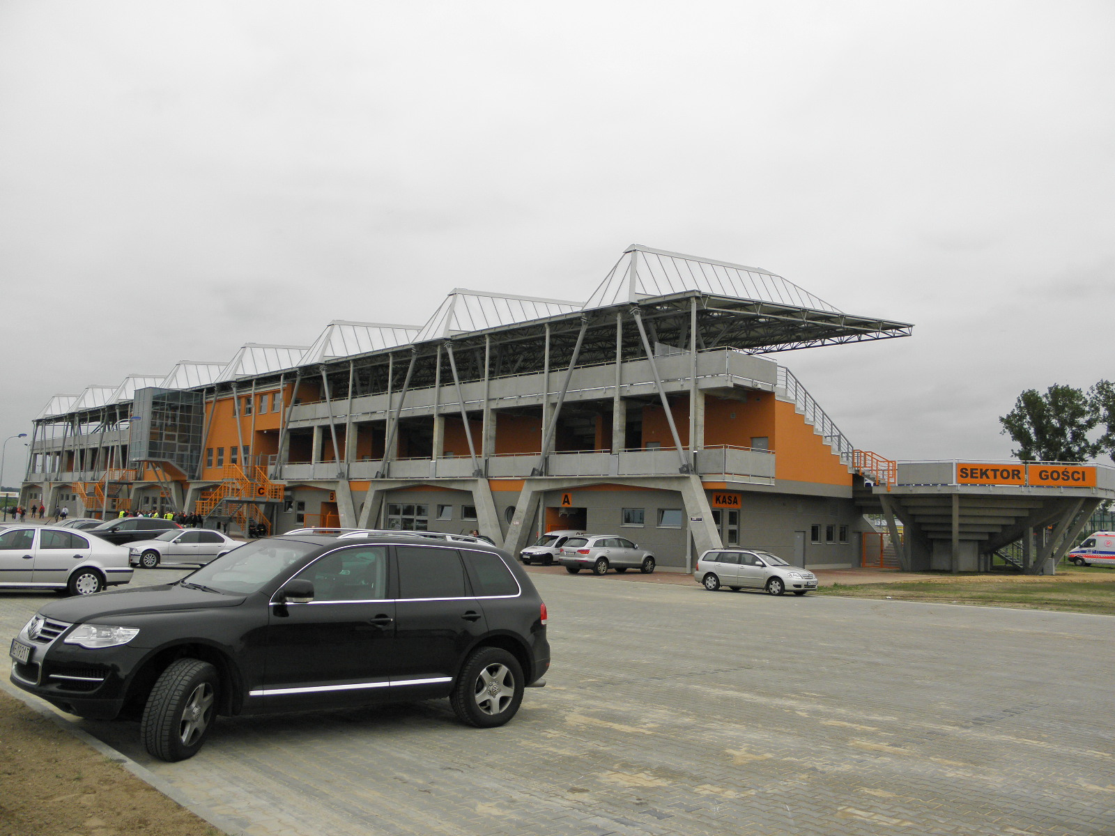 Siedlce-stadion na Błoniach-widok na tył trybuny